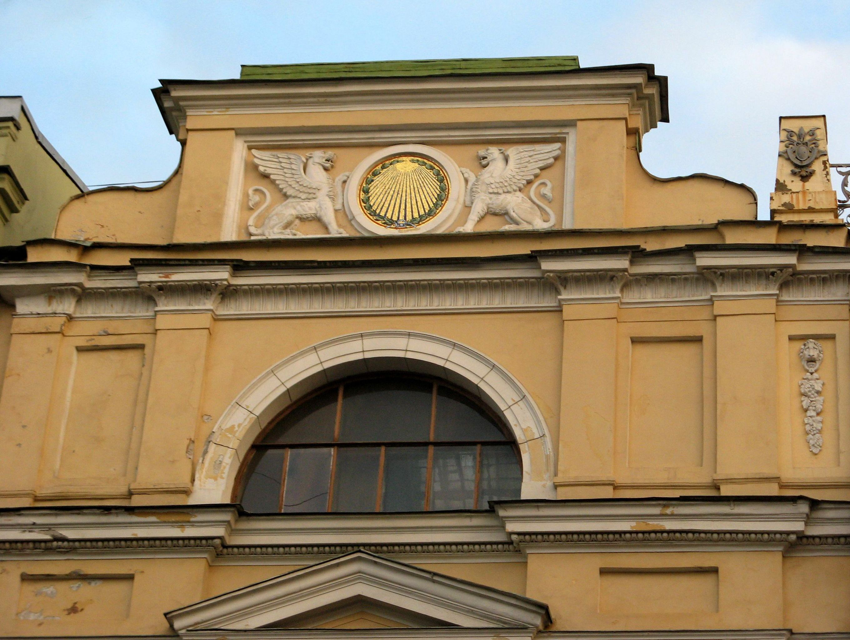 Дом Общества поощрения художеств с дворовыми флигелями (Санкт-Петербург и Лен.область, Санкт-Петербург, Большая Морская улица, 38, р. Мойки наб., 83)